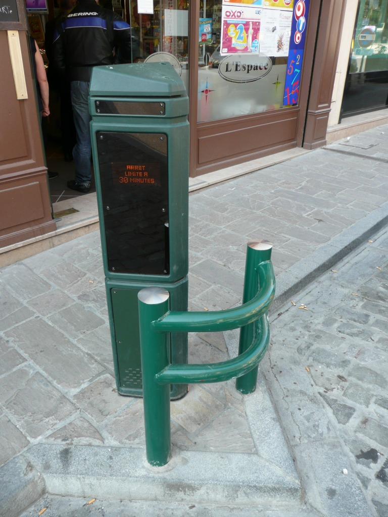 Borne de stationnement "Arret minute" de Technolia (produit "Statio'Minute"), avec détecteur de véhicule, décompte automatique du temps restant, et avertissement en cas d'infraction.